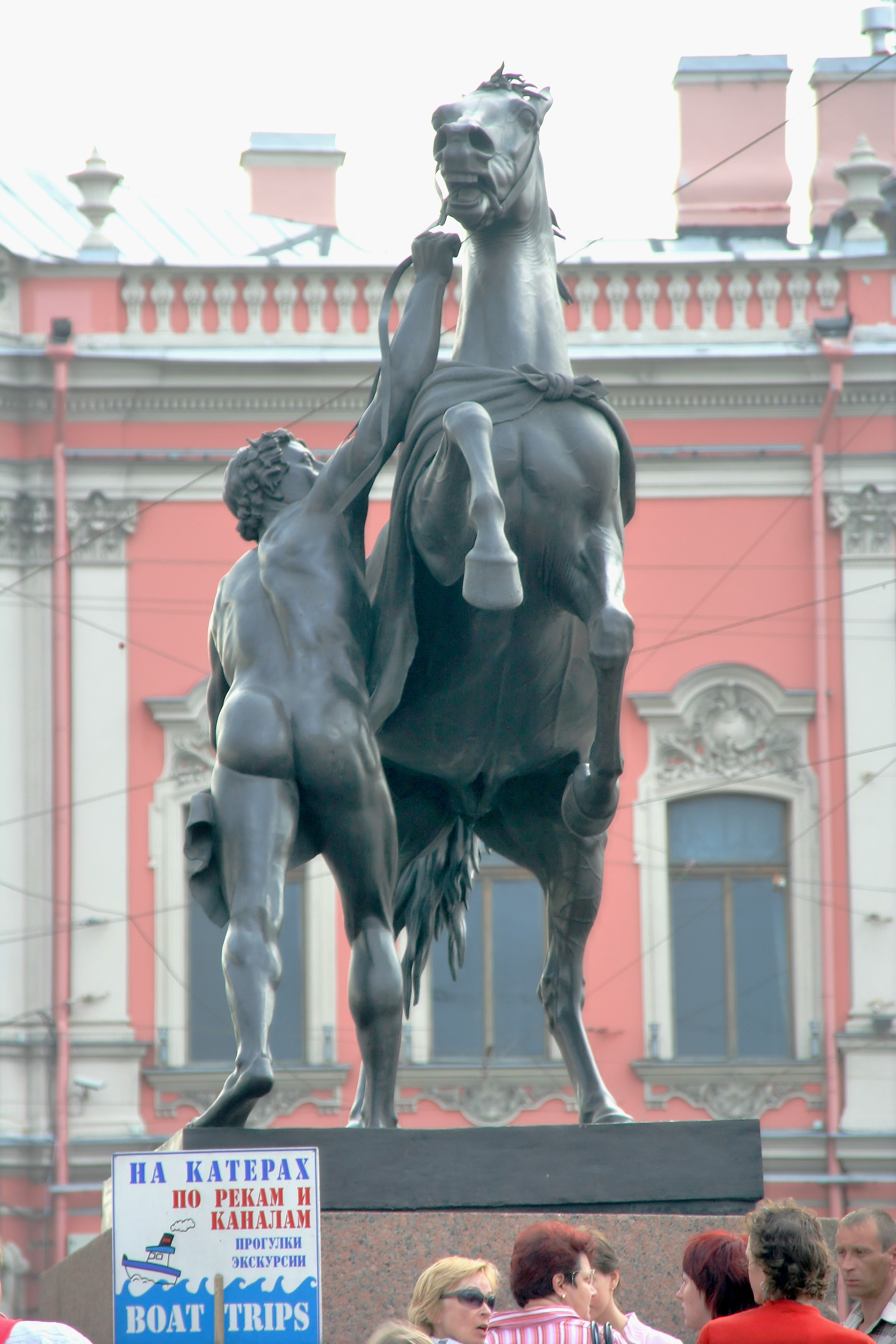 Statue d'un dompteur, avec le palais Belosselski-Belozerski en fond. Vue d'un des dompteurs du pont Anitchkov, avec le palais en arrière-plan.